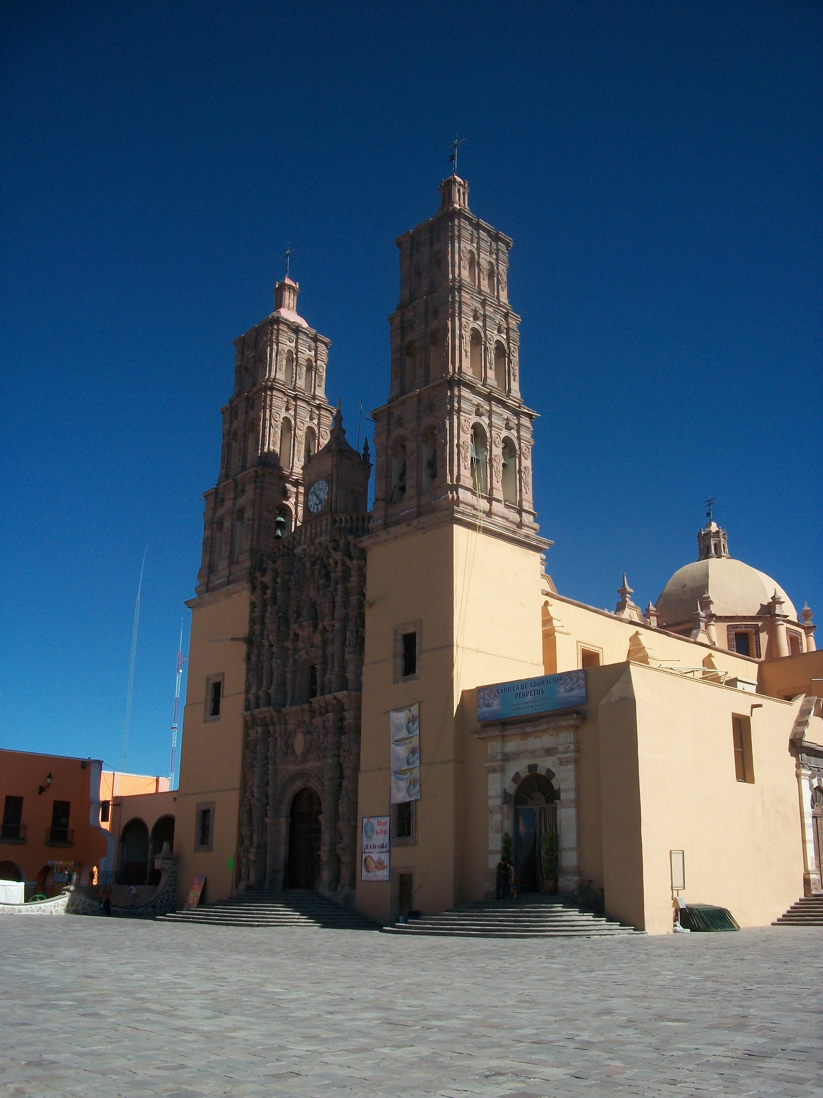 Atrio y frontispicio de la parroquia de Dolores Hidalgo CIN, Guanajuato, México, donde el cura Miguel Hidalgo convocó, la madrugada del 16 de septiembre de 1810, al levantamiento armado con el que inició la Guerra de Independencia de México.